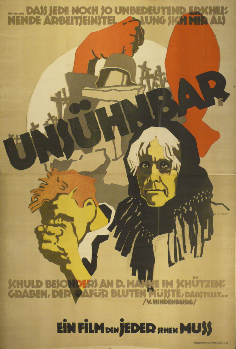 Plakat zum Film "Unsühnbar", Hans Rudi Erdt (1883–1925), 1916/17, Museum für Kunst und Gewerbe Hamburg, Inv.nr. EP2013.630 (Alter Bestand)